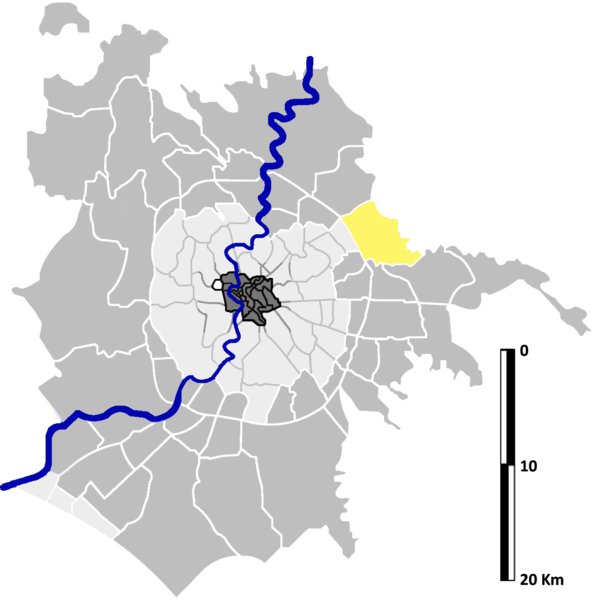 Settecamini